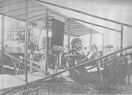 a Japanese pilot ,武石浩玻（Kouha Takeishi）